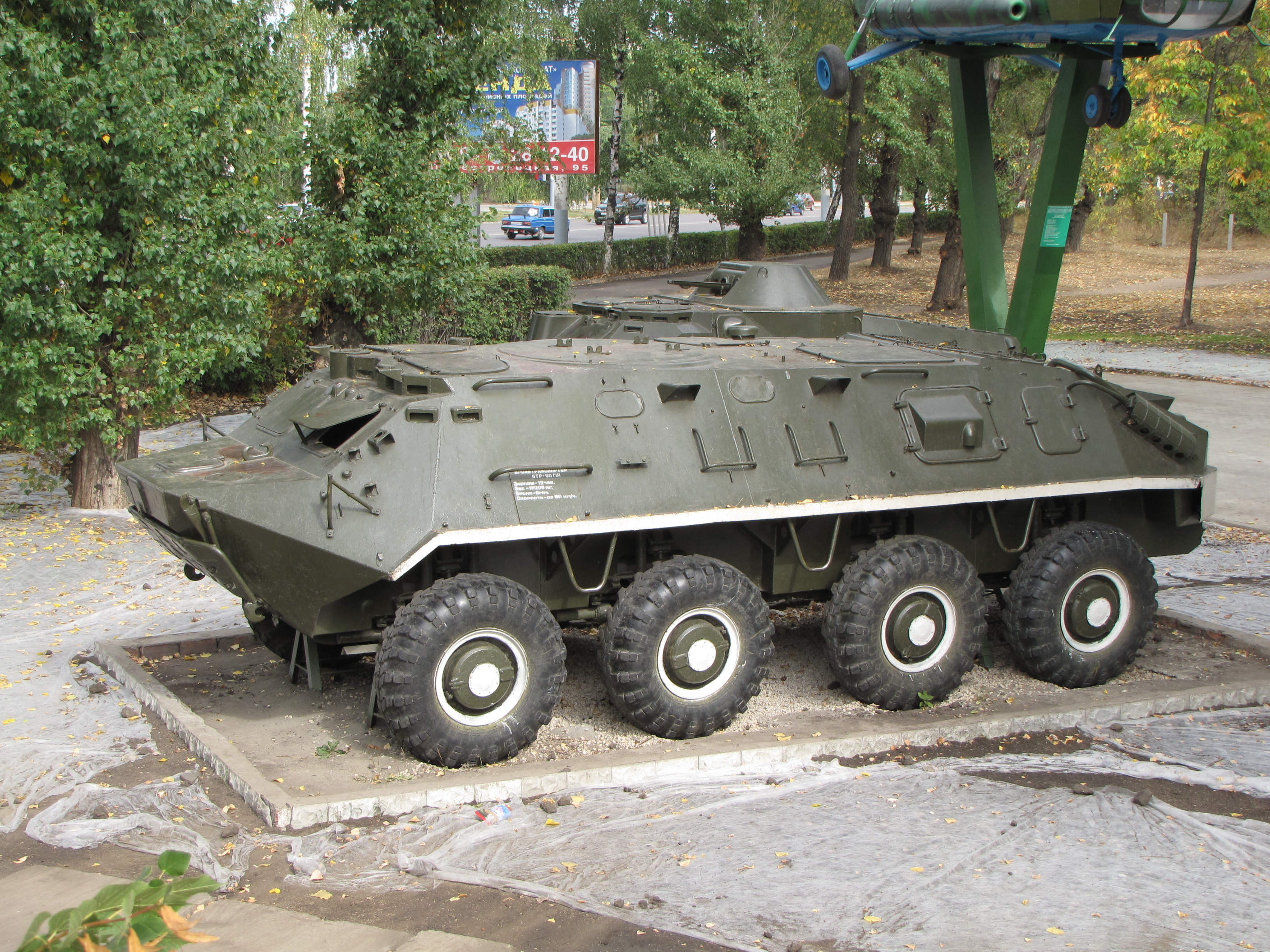 БТР-60. музей в Воронеже